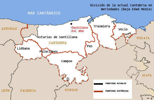 División de Cantabria en merindades (con mayor o menor grado de autonomía) en la Baja Edad Media. FUENTE: Este trabajo está basado en una imagen publicada en donde se muestran los límites aproximados de las merindades.